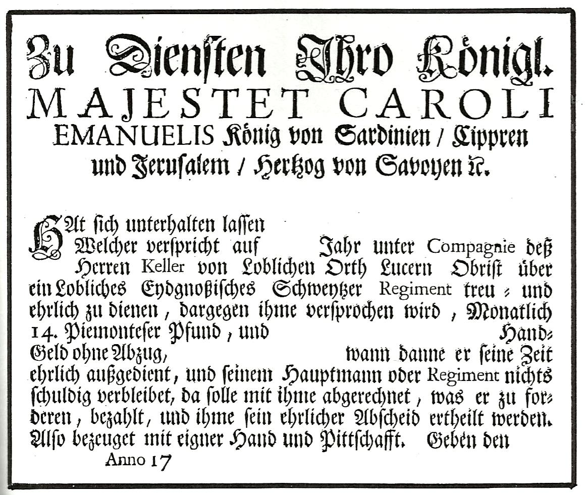 Werbeformular für die Oberstenkompanie des Regiments Keller in Sardinien-Piemont